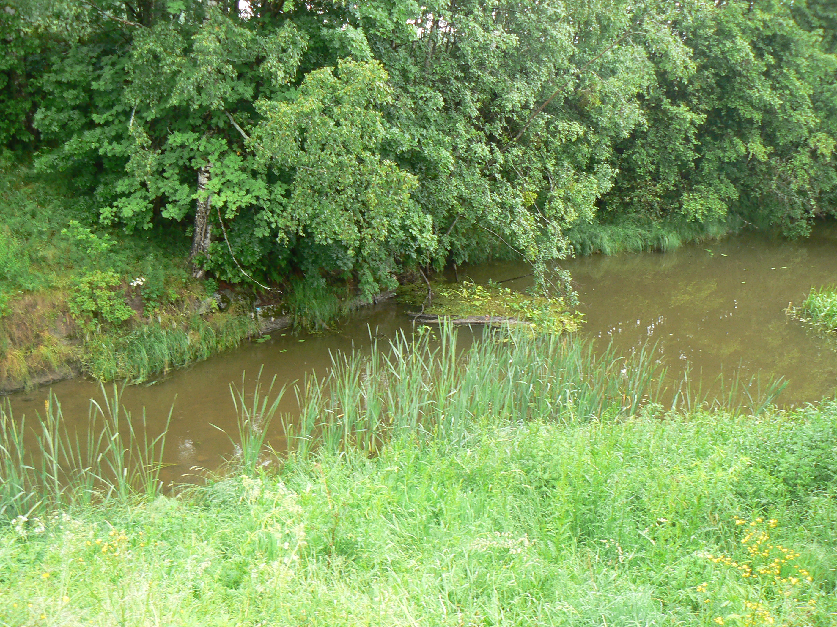 Uppboån ("Uppbo river") at the bridge in Uppbo/Nedernora.